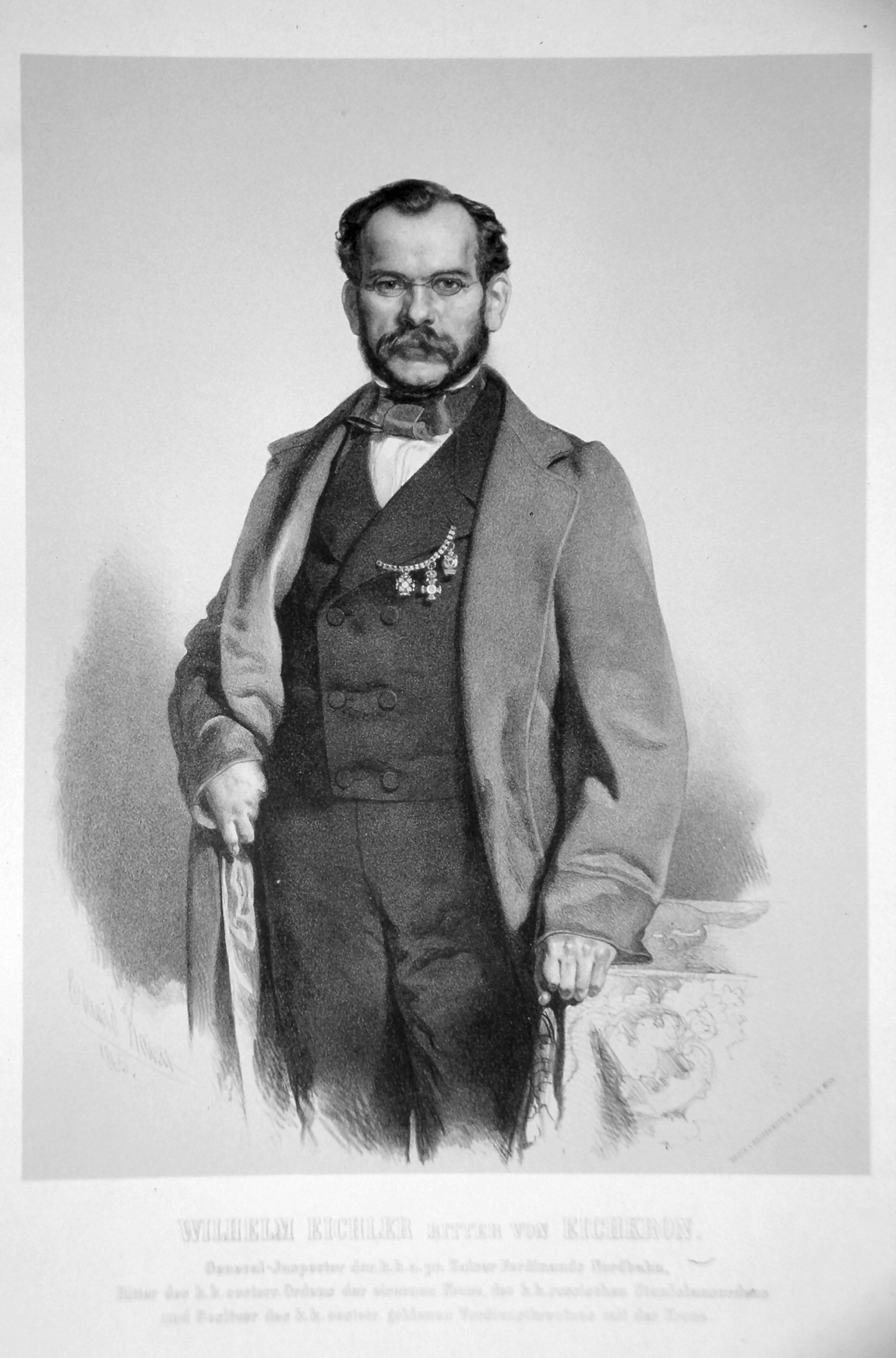 Wilhelm Eichler von Eichkron (1818-1892), Freiherr, deutsch-östereichischer Eisenbahntechniker und Bauunternehmer. Lithographie von Eduard Kaiser, 1865